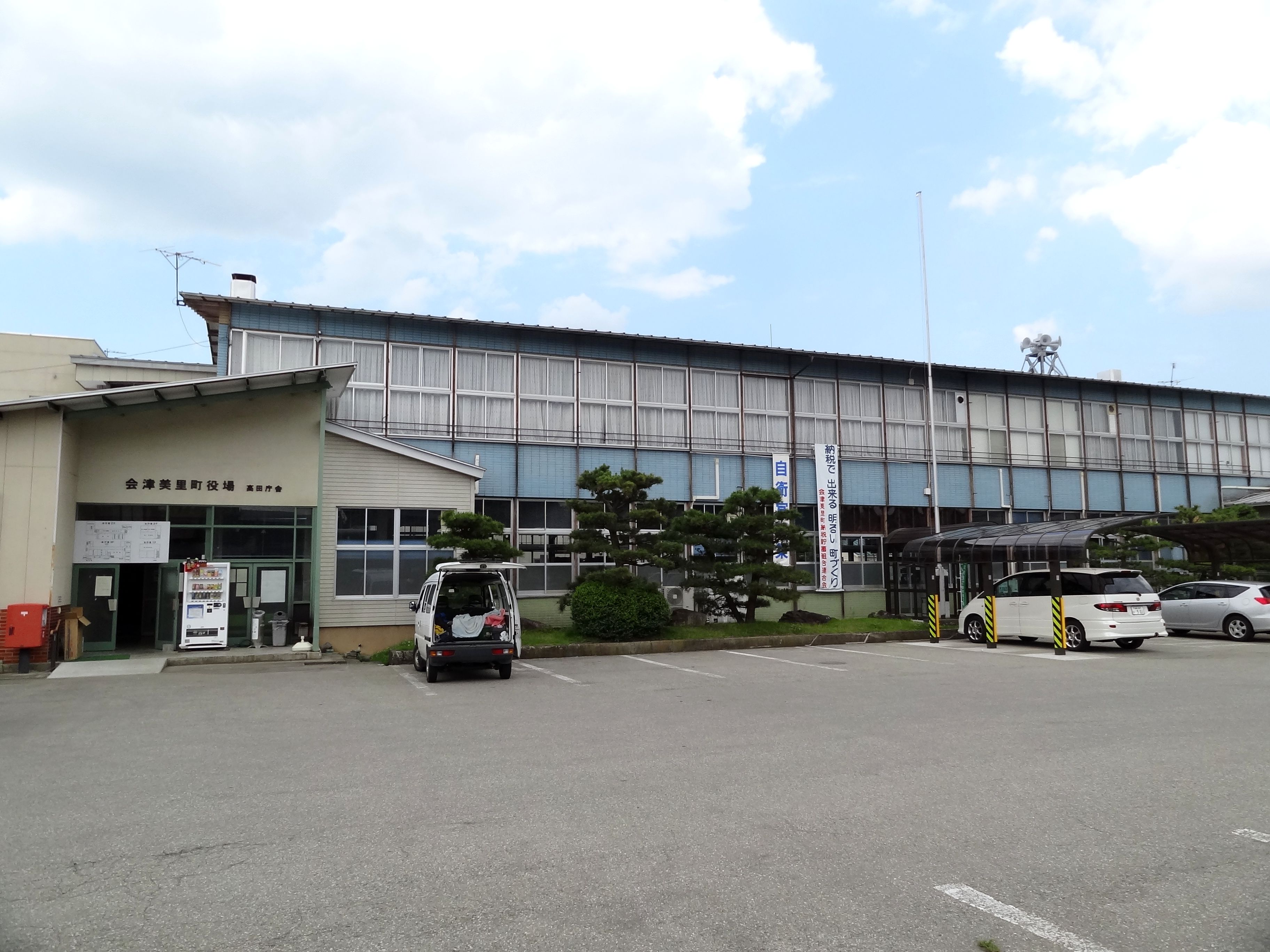 会津美里町役場（高田庁舎）